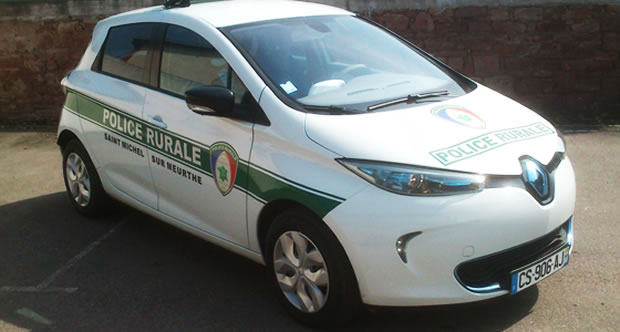 Véhicule électrique de la police rurale